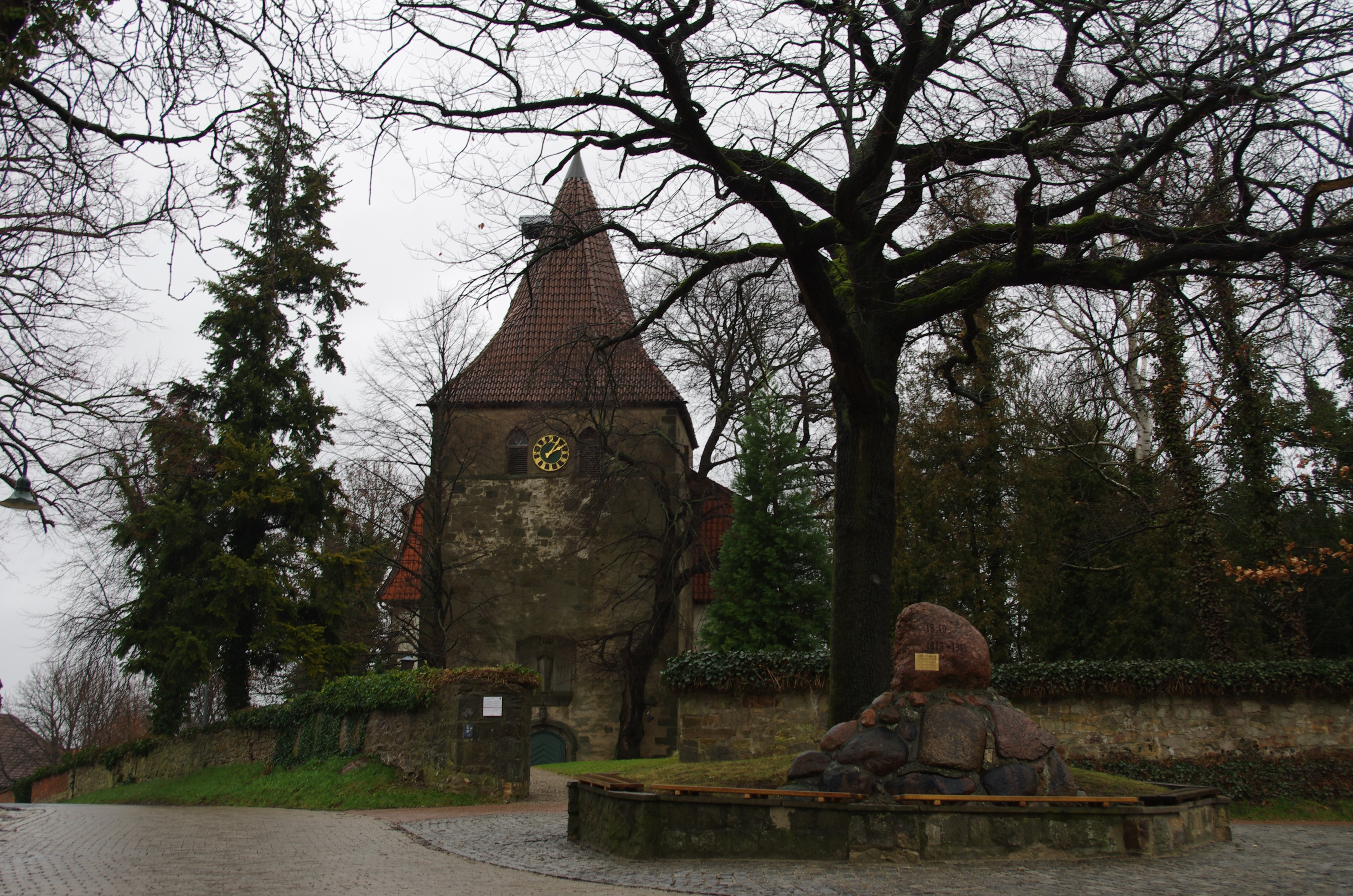 Pattensen, Ortsteil Jeinsen. Die evangelische Kirche mit dem Kriegerdenkmal.